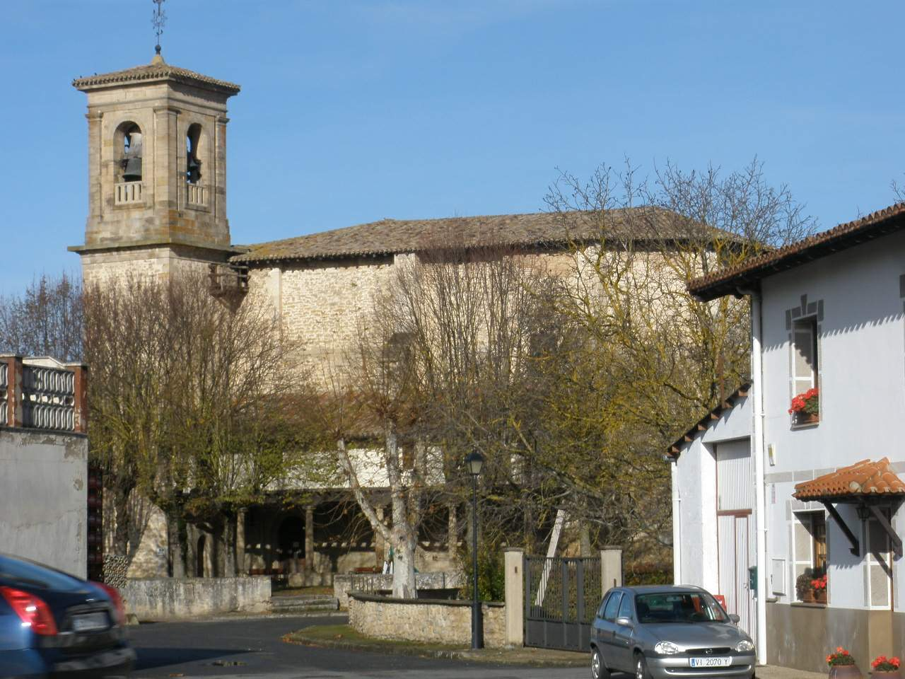 Ilárraza (Álava) - Iglesia de Santa Eulalia